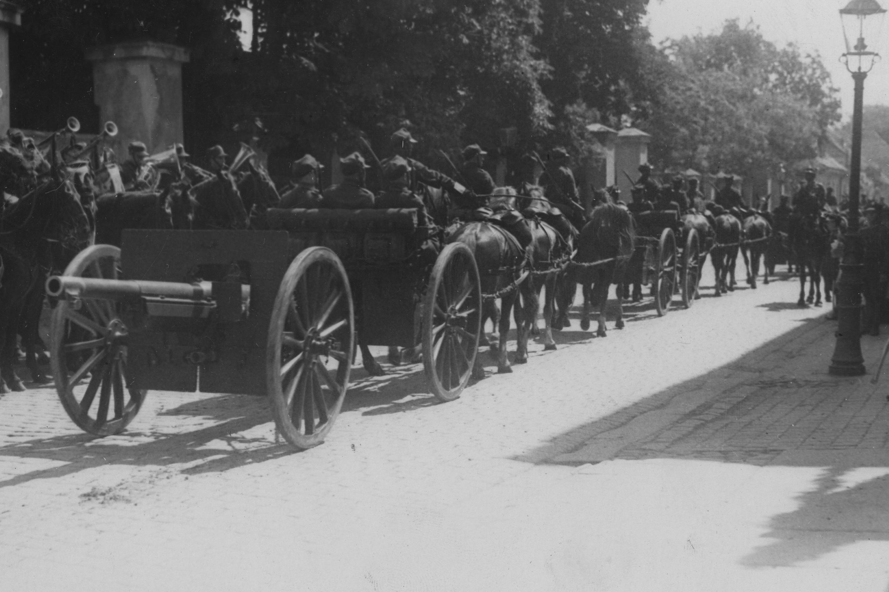 Święto 14 Pułku Artylerii Lekkiej Wielkopolskiej z Poznania; czerwiec 1931 r. Defilada baterii armat polowych 75 mm wz. 1897 Schneider z przodkiem w trakcji konnej. Koncern Ilustrowany Kurier Codzienny - Archiwum Ilustracji. Sygnatura: 1-W-1510-2